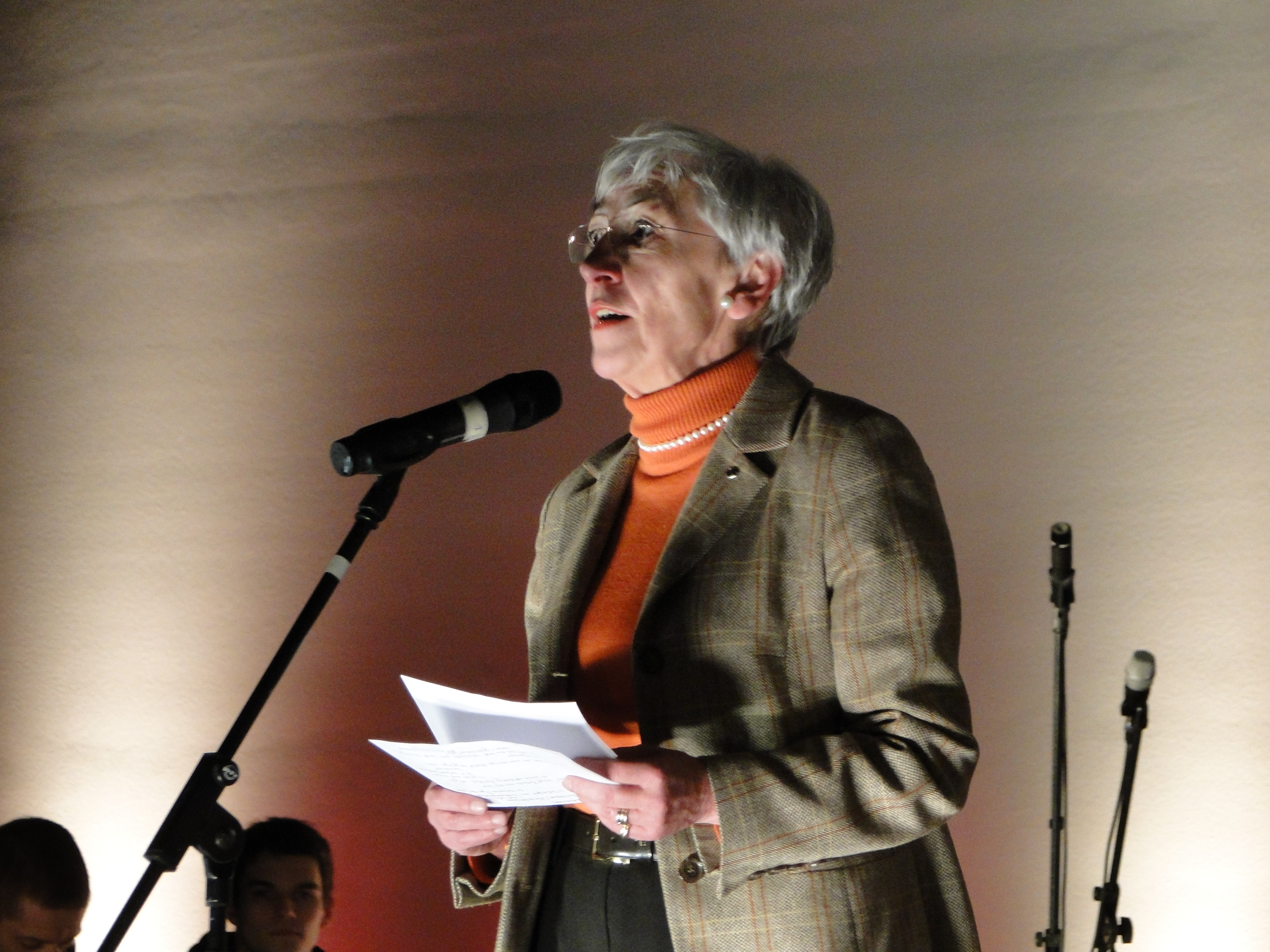 Anglistin Prof. Ursula Schaefer (TU Dresden) während einer Veranstaltung 2010